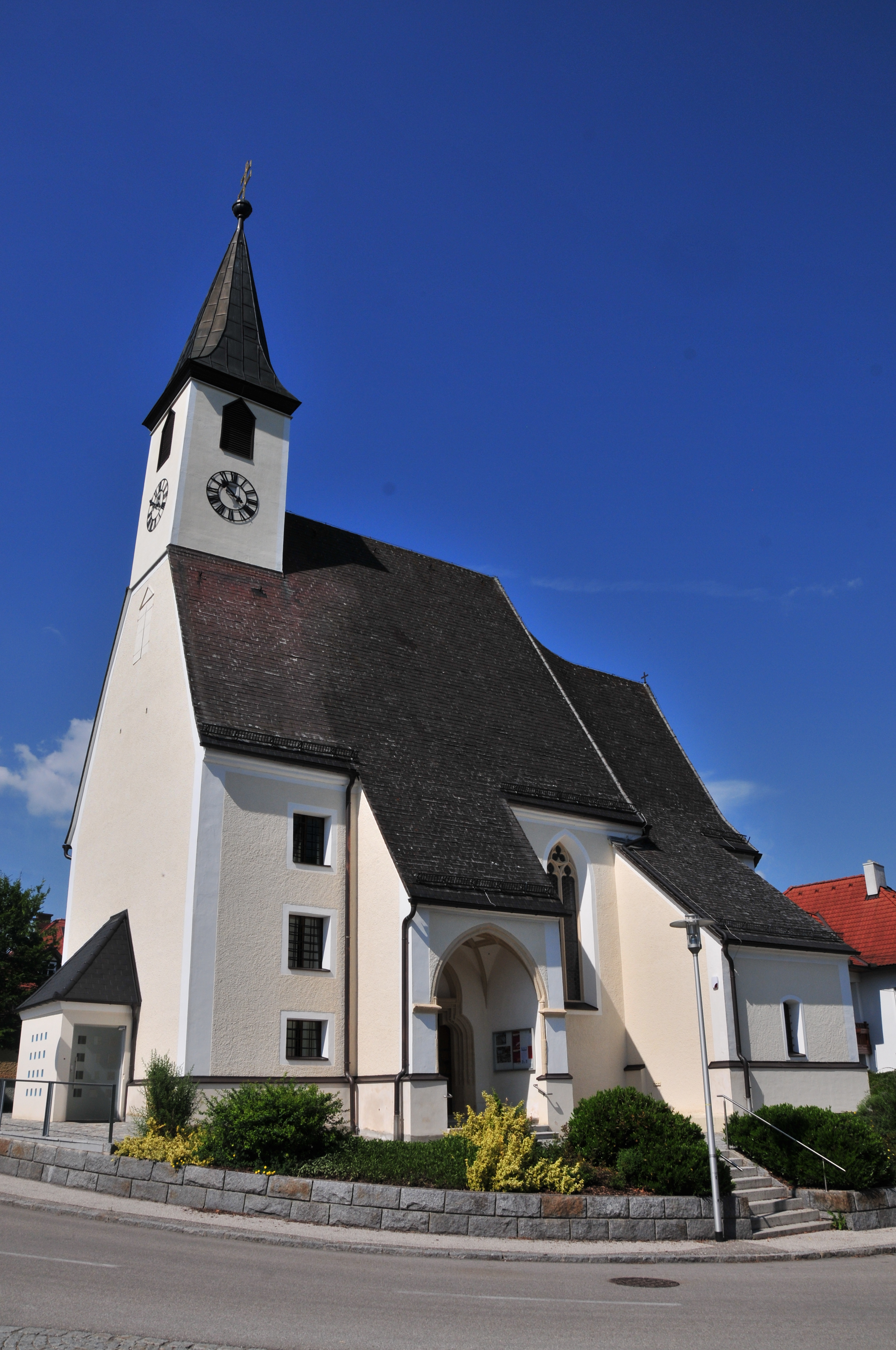 Kath. Pfarrkirche hl. Bartholomäus und Friedhof